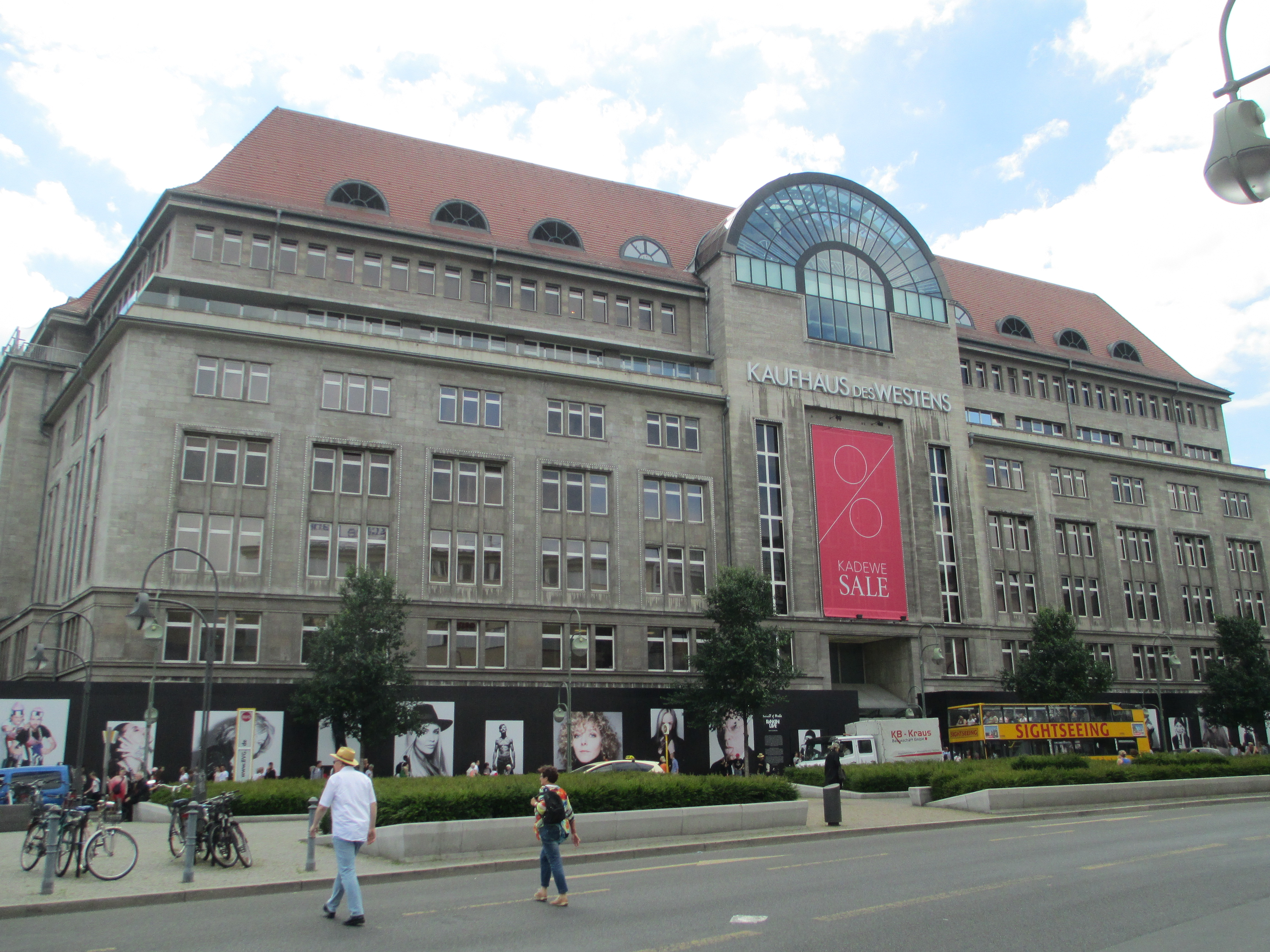 כלבו קה.דה.וה.